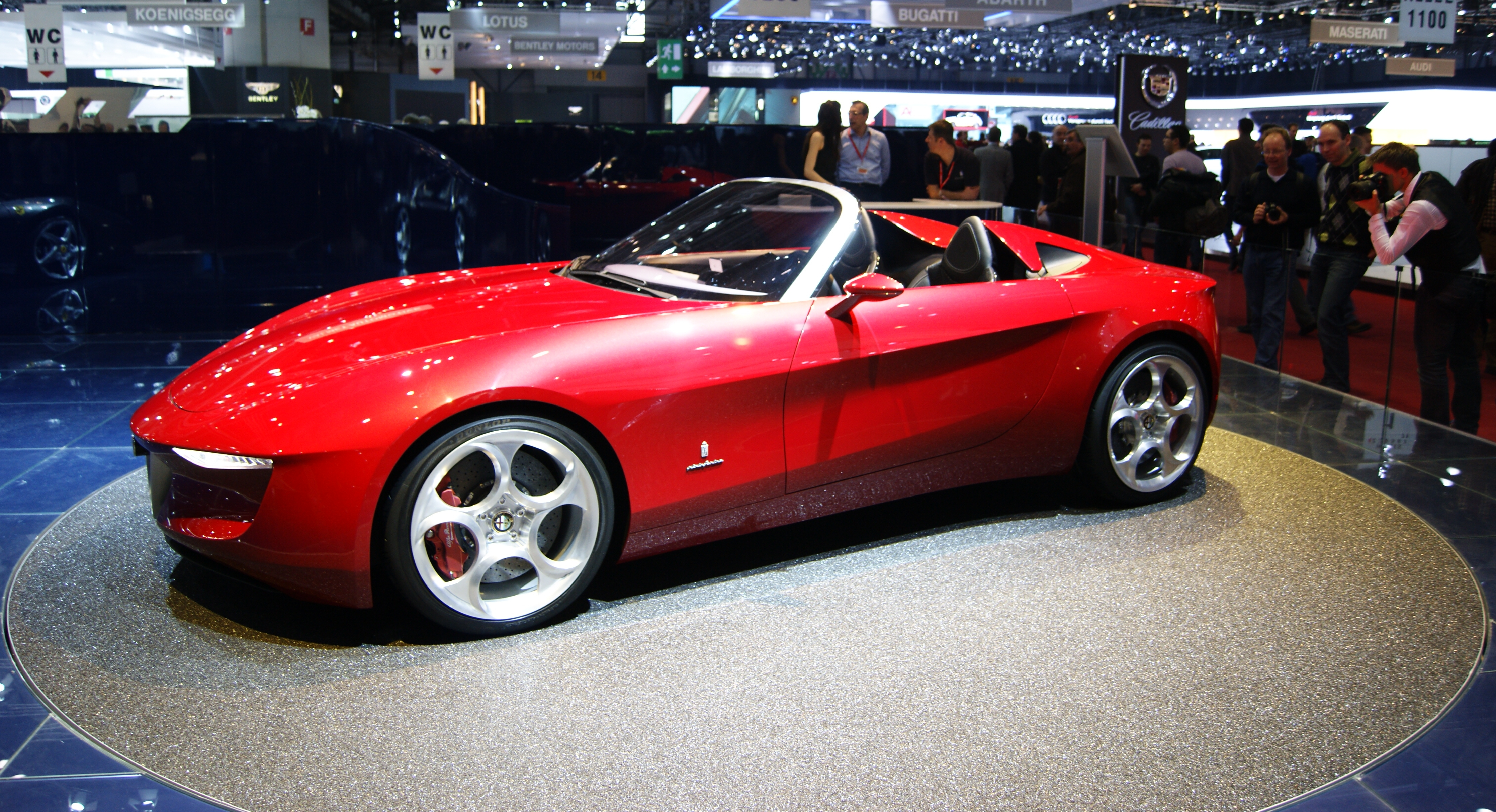 Prototype alfa roméo par Pininfarina, salon de l'auto de Genève 2010